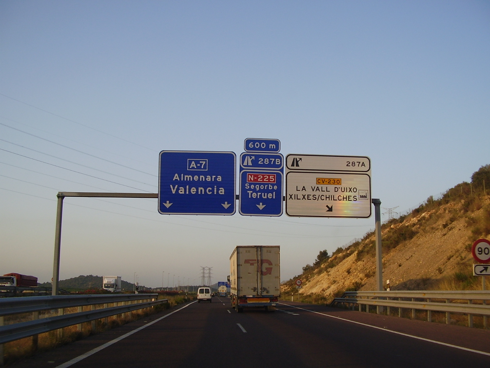 Indicador de la A-7